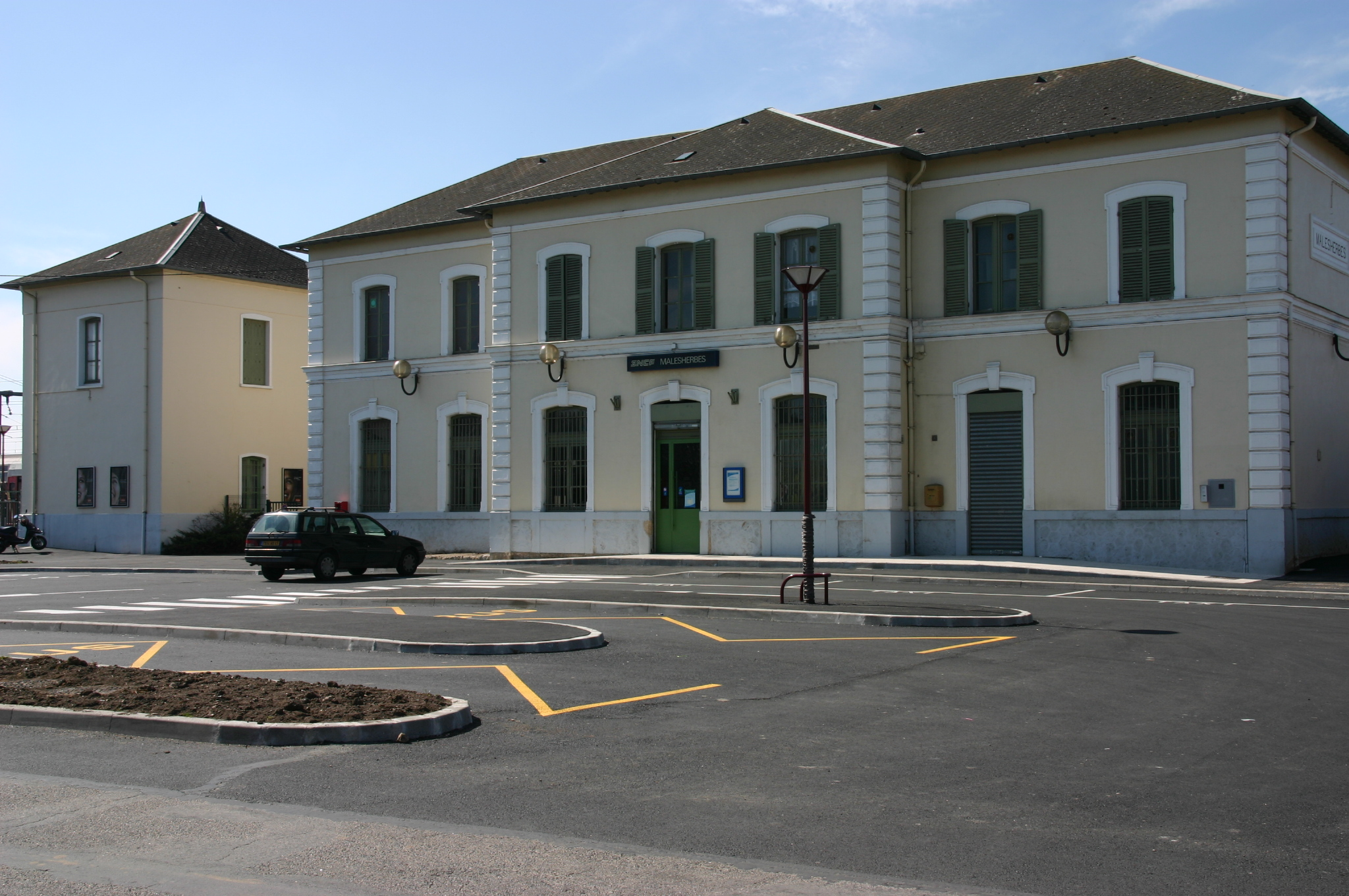 Gare de Malesherbes, Loiret (France)